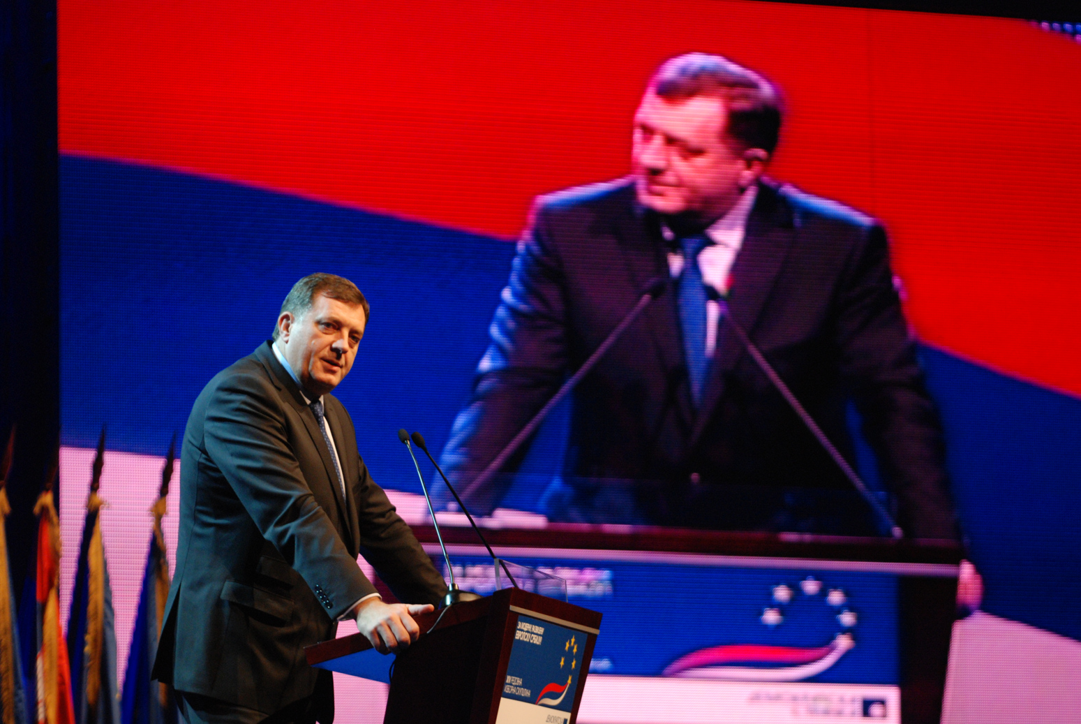 BEOGRAD, 18.12.2010. - XIV Izborna skupstina Demokratske stranke u Sava Centru. FOTO: Foto servis DS / KONTRAFOTO